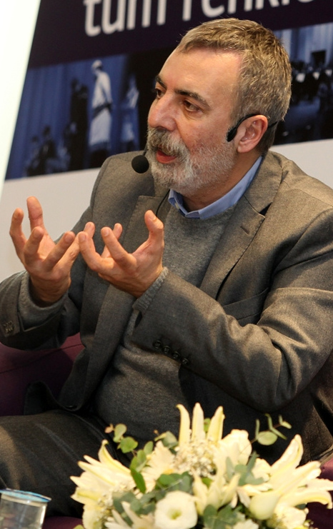 Orhan Alkaya